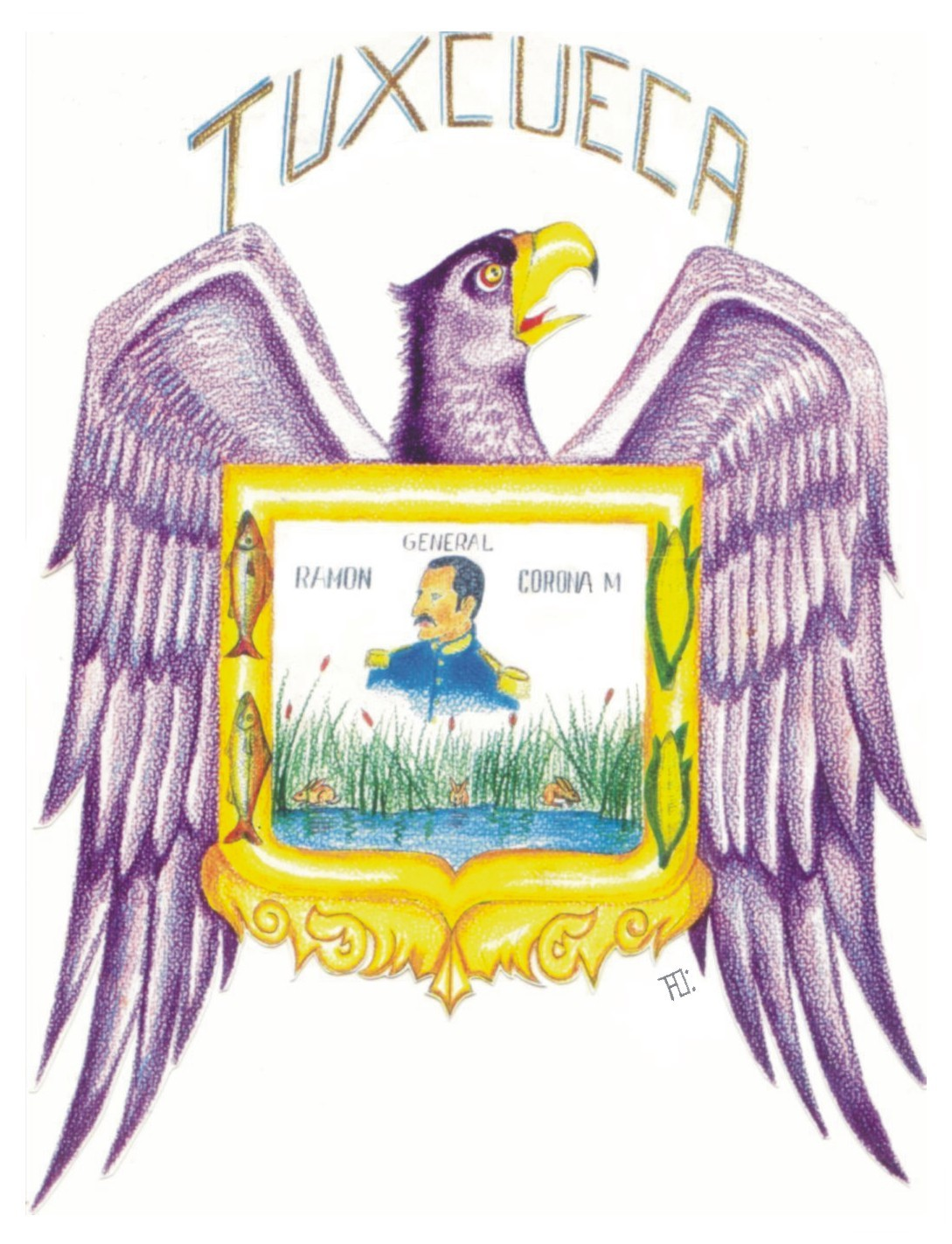 el escudo de armas de Tuxcueca se realizó durante la administración del presidente municipal, Luis Mancilla Arechiga, quien por medio de una convocatoria Municipal promovió la realización de éste, durante el concurso resultó ganador el trabajo presentado por el maestro: Francisco Javier Basulto Origel oriundo de ésta municipalidad quien representa en su trabajo un bosquejo de los elementos mas significativos del municipio, como lo es: las actividades económicas mas importantes (agricultura y pesca). Además en centro del escudo se aprecia el busto del general "Ramón corona Madrigal" que también es nativo del municipio y que además fuera un gran estratega militar y político en tiempos de la reforma y posterior, así mismo formó parte del gabinete selecto del ilustre presidente Benito Juárez G. Al nombrarlo General en jefe del ejercito de occidente, teniendo en su haber innumerables batallas en beneficio de su país, en el Ámbito político fue nombrado ministro plenipotenciario de España y Portugal haciendo un gran papel para México, igualmente fue gobernador del estado de jalisco haciendo incontables beneficios para su gente dentro de los cuales destaca nombrar cabecera municipal a su querido Tuxcueca, fundar el montepio, apoyar la construcción de escuelas y universidades dando un gran auge al estado de jalisco durante su mandato. el águila en el escudo representa la identidad con México y la ornamenta en la parte baja es la influencia europea como legado.